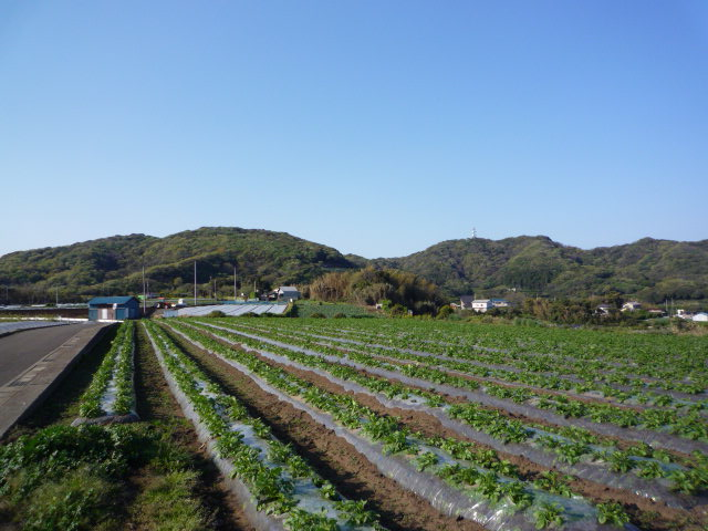 武山の画像 津久井浜側から撮影。